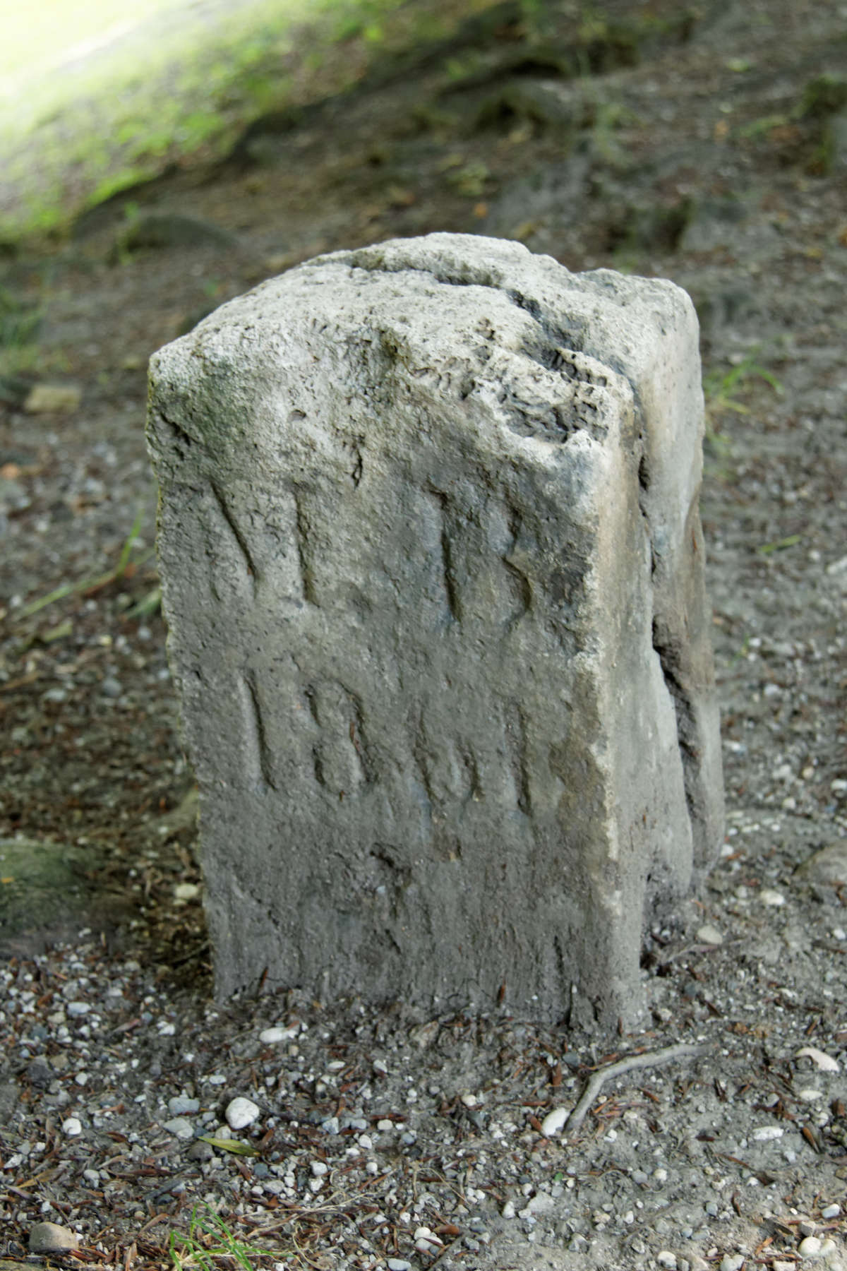 Grenzstein des Münchner Burgfriedens, 1861 auf der Grenze zwischen der damals noch eigenständigen Gemeinde Bogenhausen und dem 1854 eingemeindeten Stadtteil Haidhausen am Isarhochufer errichtet, die mit "M.B." beschriftete Seite zeigt nach Haidhausen.